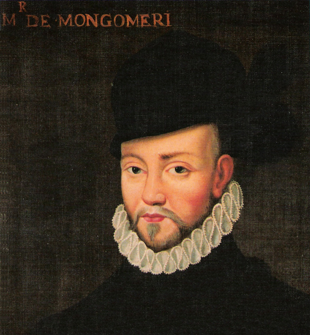 Portrait de Gabriel de Lorges, comte de Montgommery (orthographié MR DE MONGOMERY), anonyme, XVIe siècle.